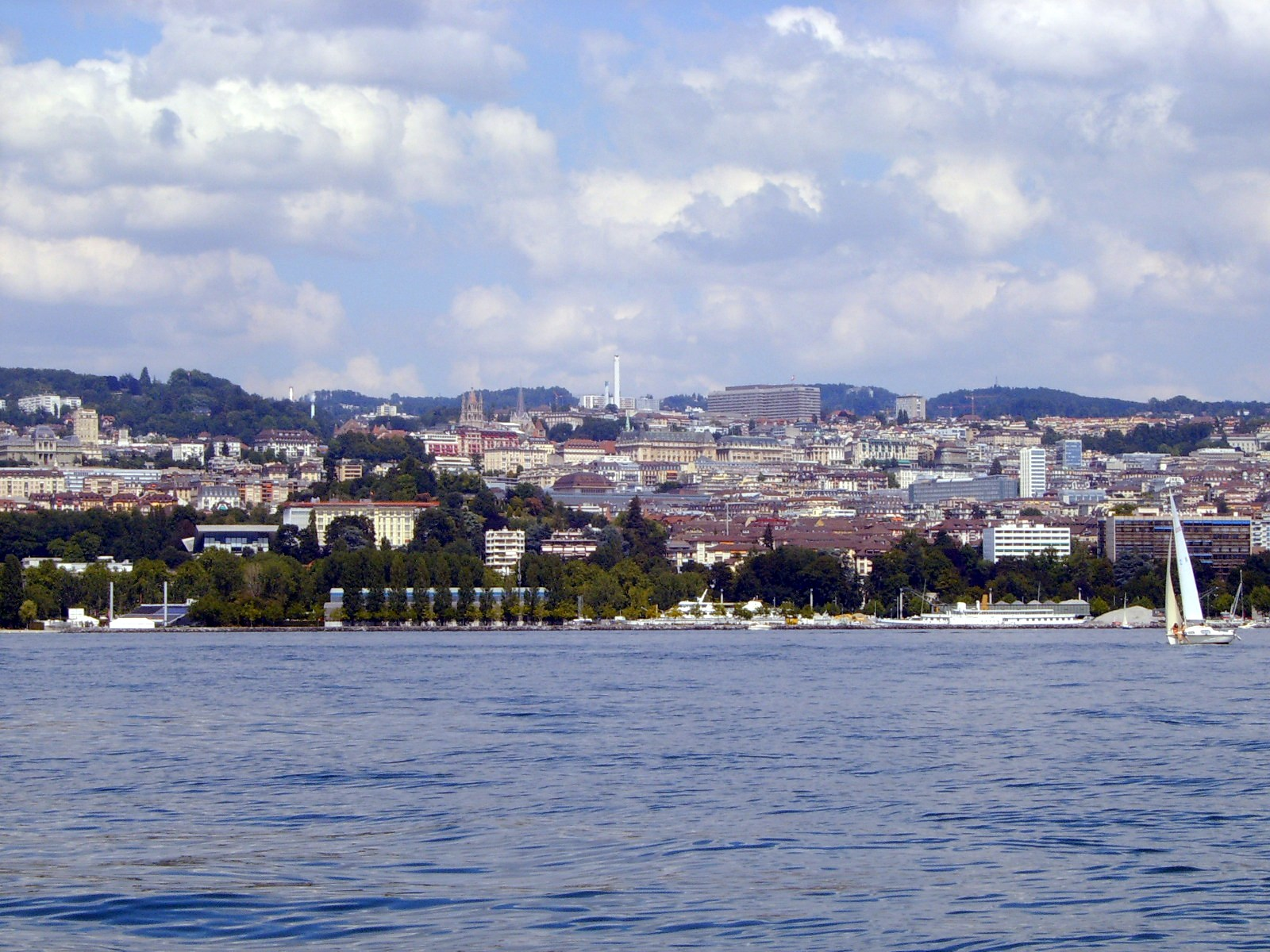 Le Centre-ville de Lausanne (Suisse) vu depuis le Lac Léman.